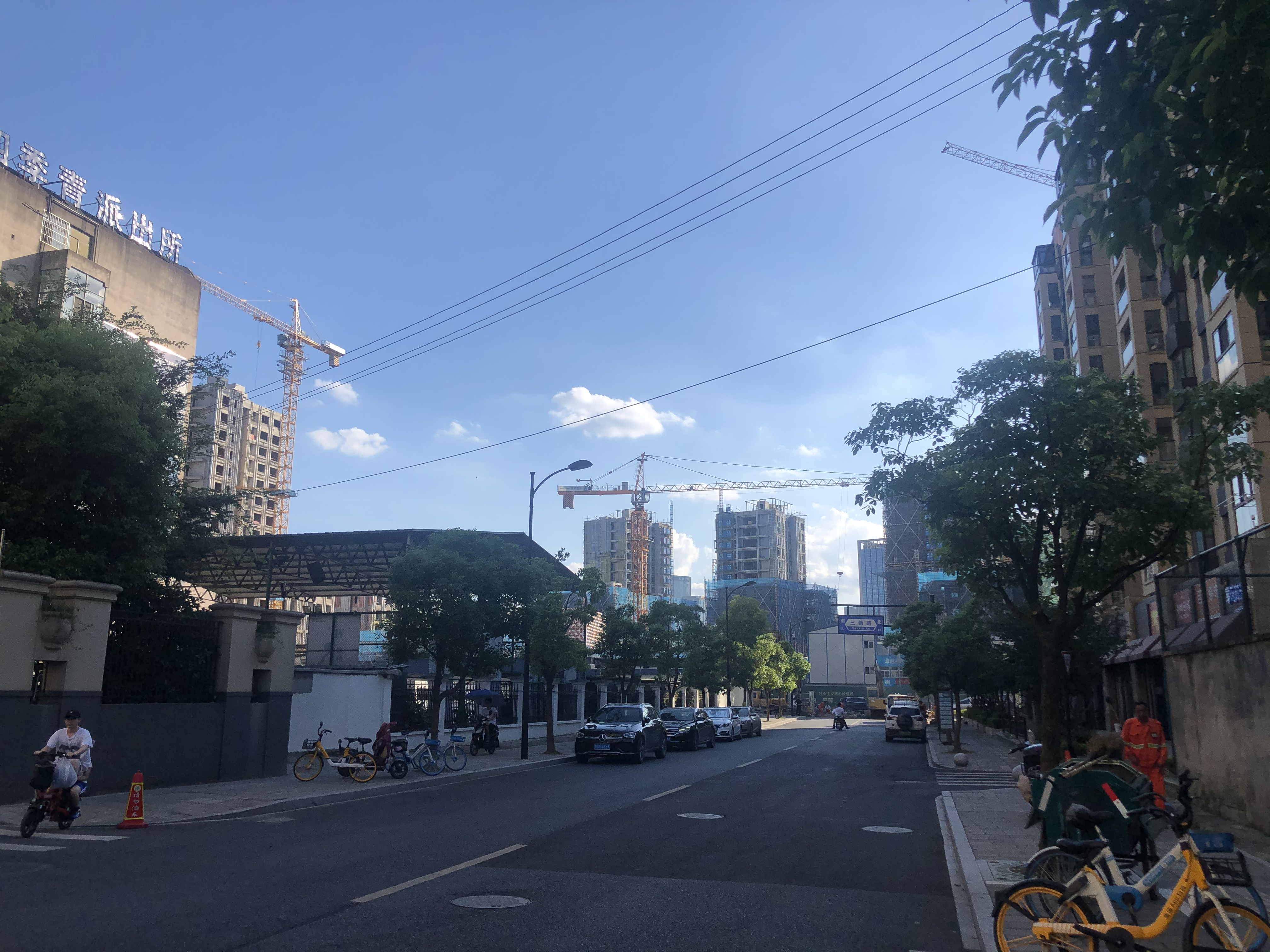 三堡北苑在右侧，左侧即四季青派出所